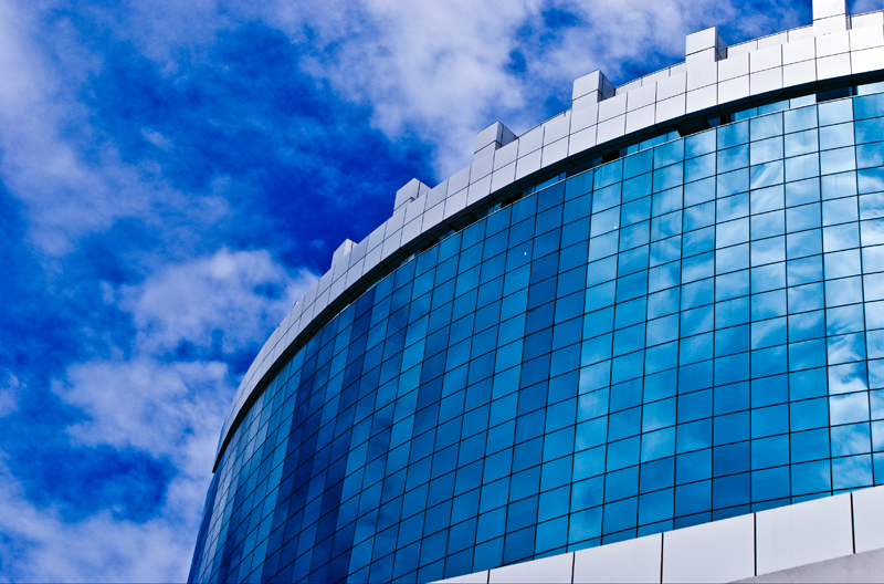 Financial Park Labuan